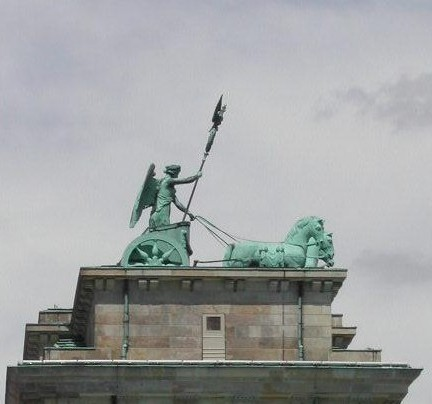 Ieweschten Deel vum Brandenburger Tor zu Berlin.